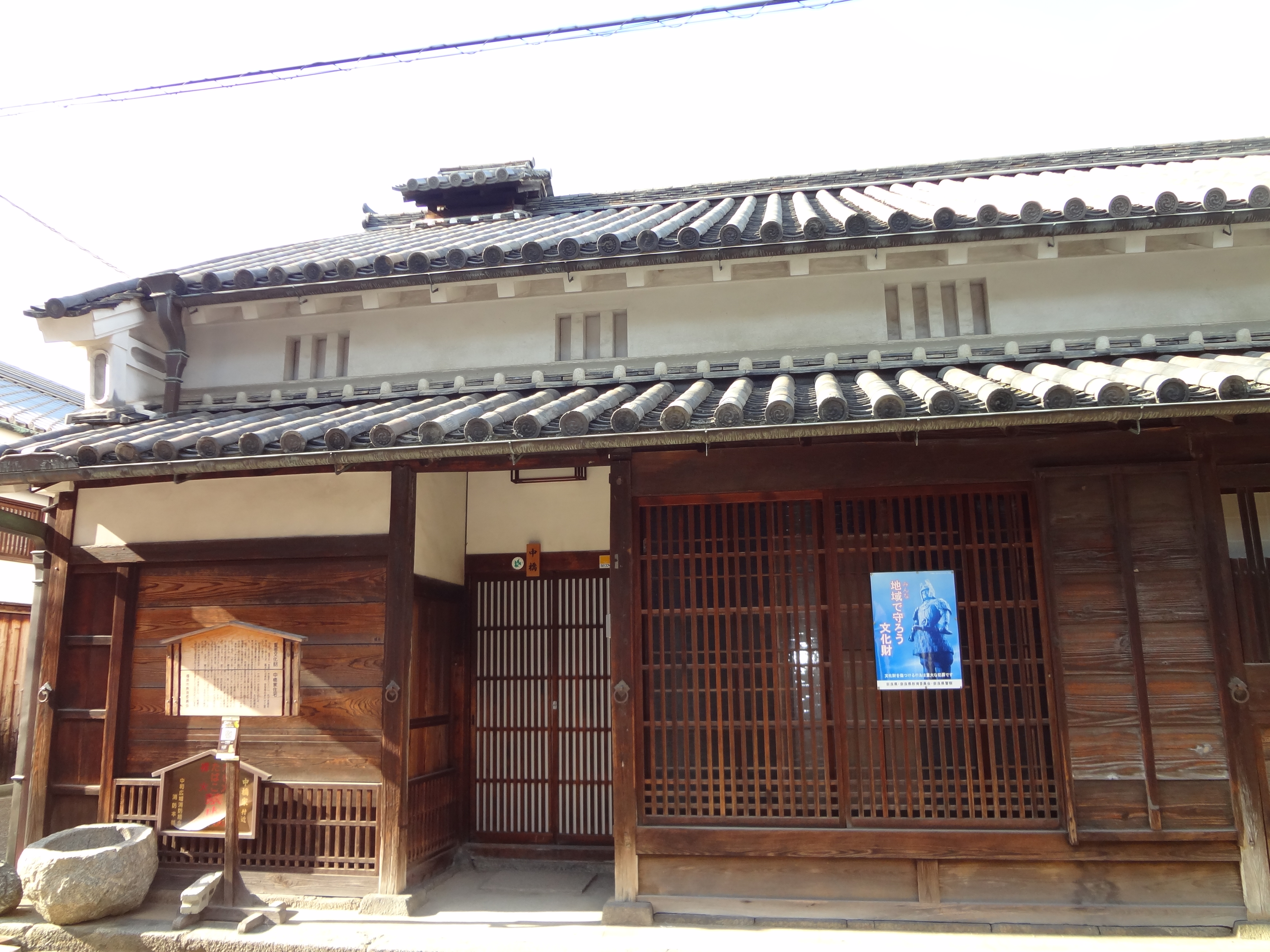 今井町御堂筋